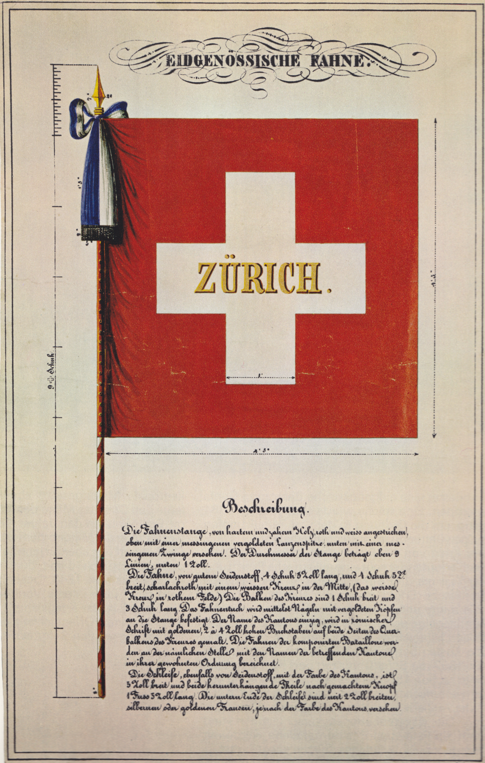 Modell der Schweizer Fahne von Carl Stauffer, das am 11. Oktober 1841 von der eidgenössischen Tagsatzung den Regierungen der Kantone definitiver Entscheid zugestellt wurde.